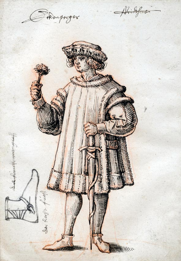 Radierung (Originalabdruck von den ersten Plattenzuständen) aus dem "Augsburger Geschlechterbuch", das in der Zusammenarbeit der Maler Johann Burgkmair d. J. und Heinrich Vogtherr d. J. entstand, Augsburg 1545